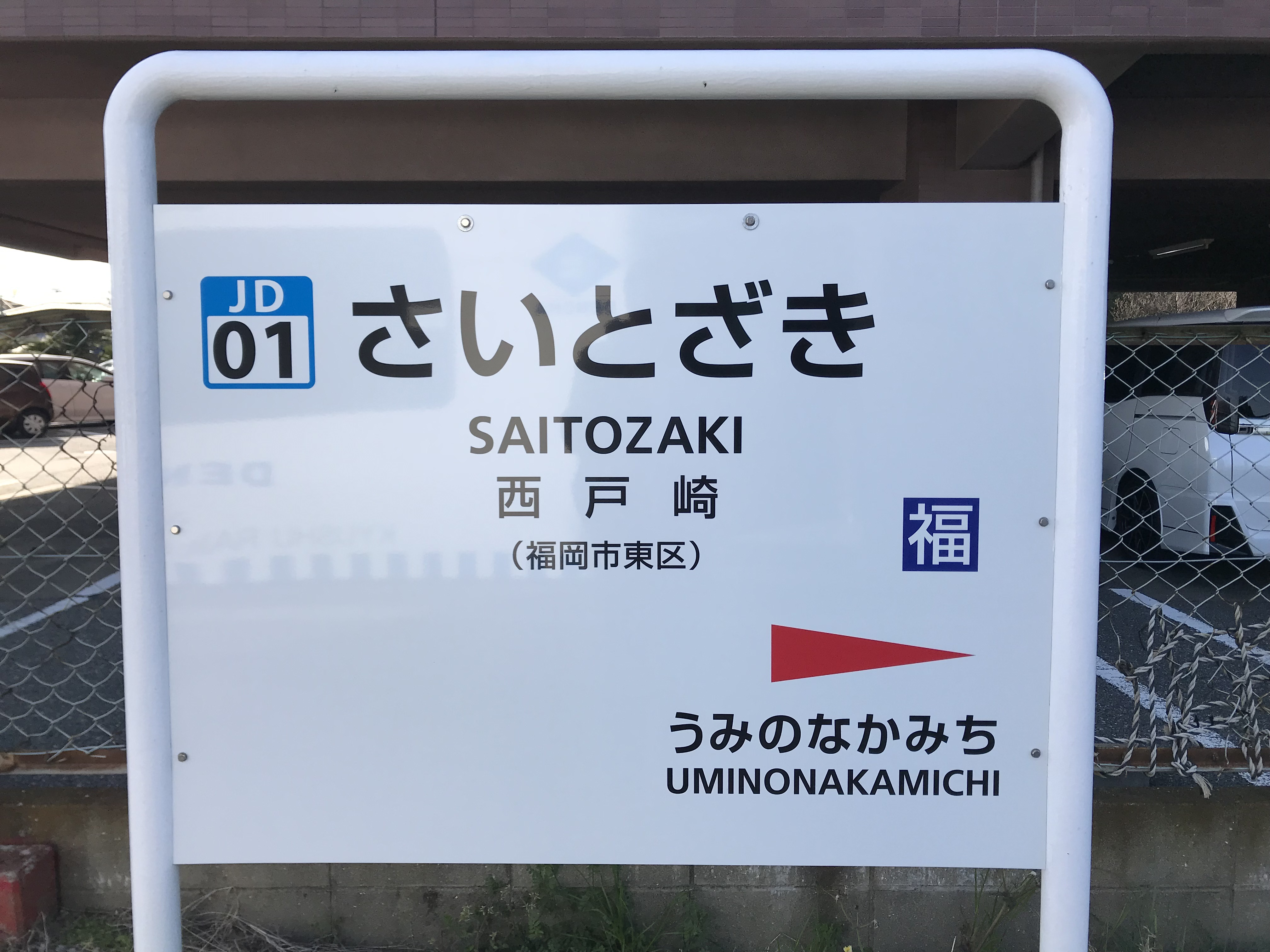 西戸崎駅の駅名標